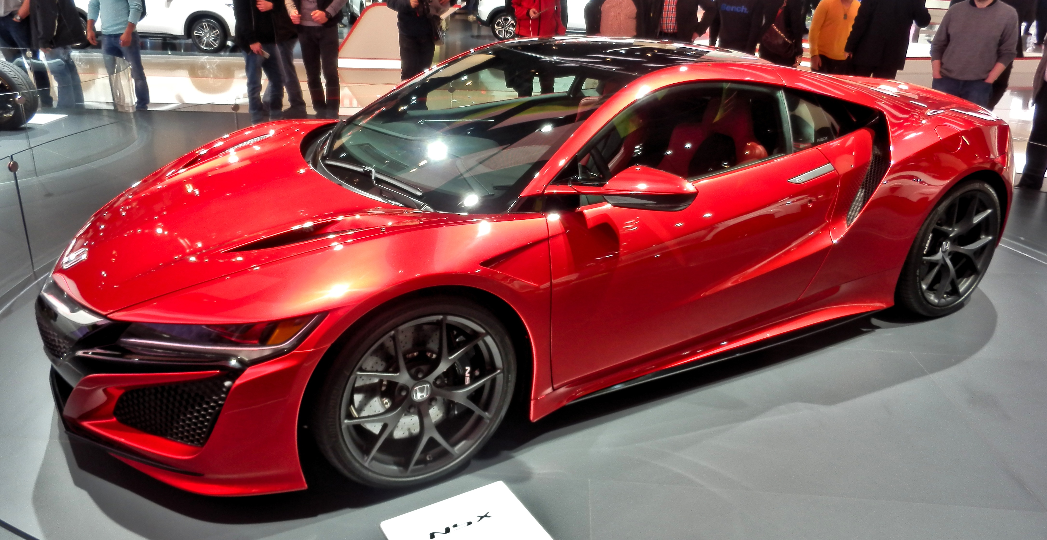 Honda NSX at IAA 2015